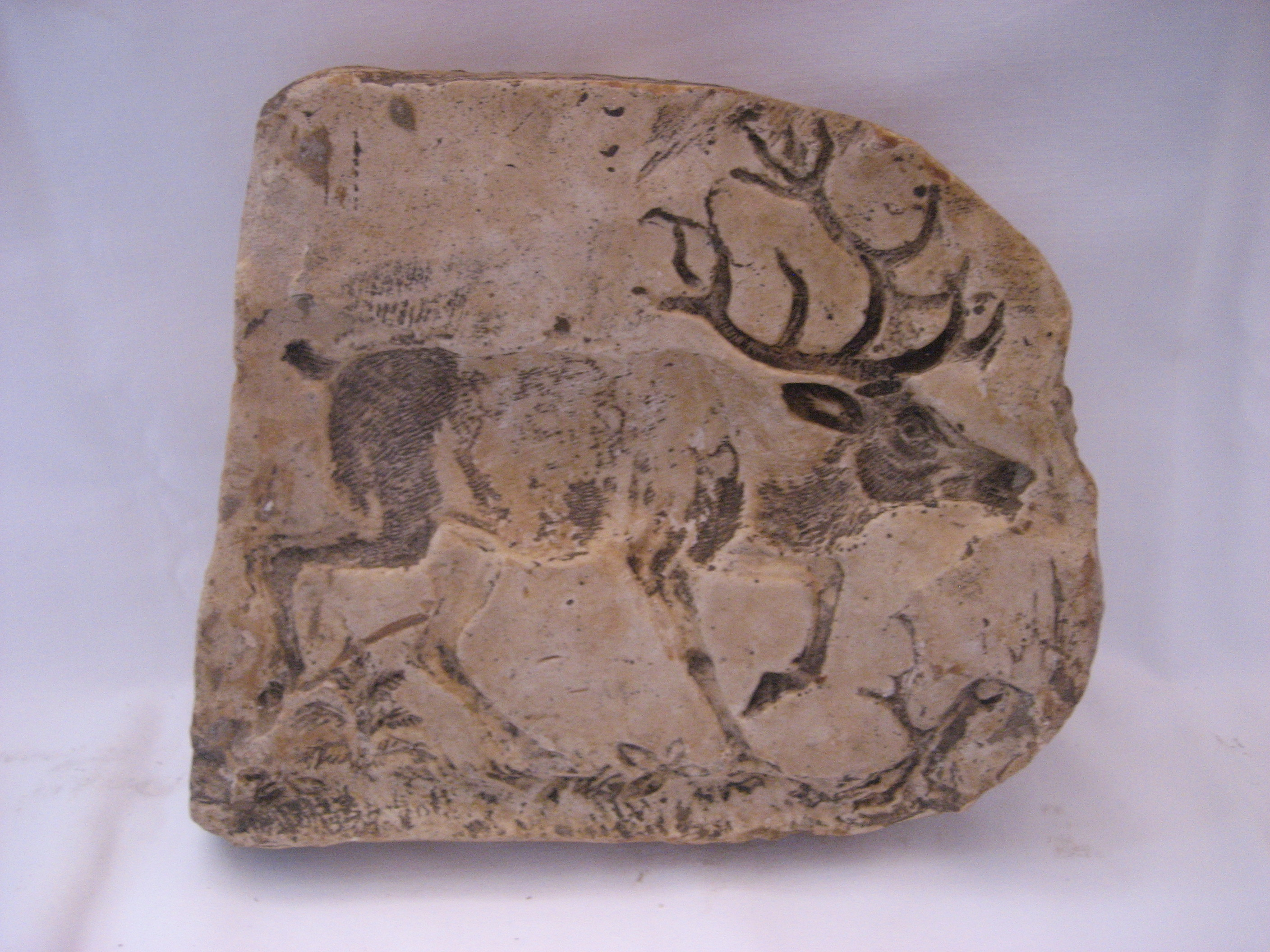 Model mit trabendem Hirsch aus St. Georgen / Rottal / Niederbayern